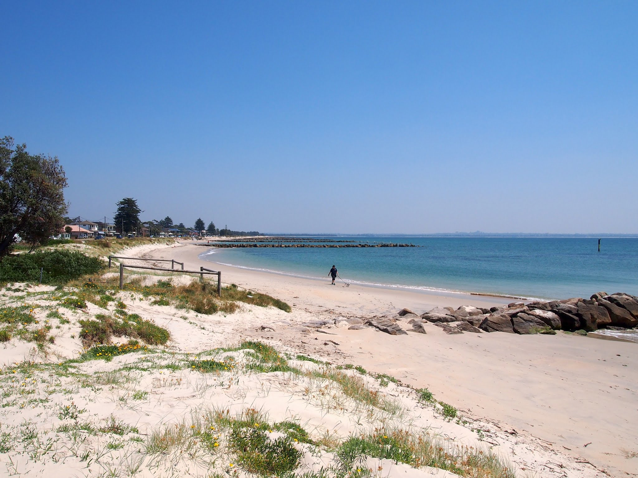 Silver Beach